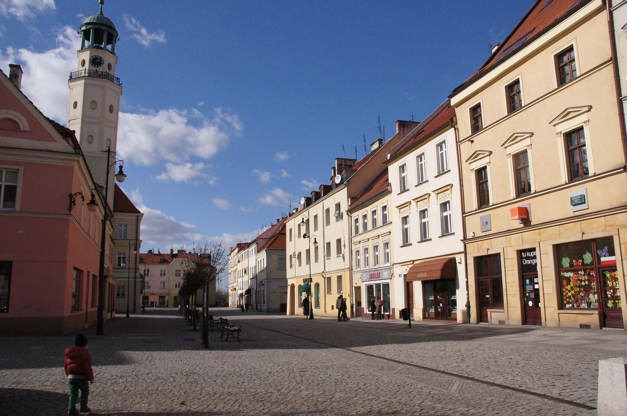 Oleśnica, ośrodek historyczny miasta